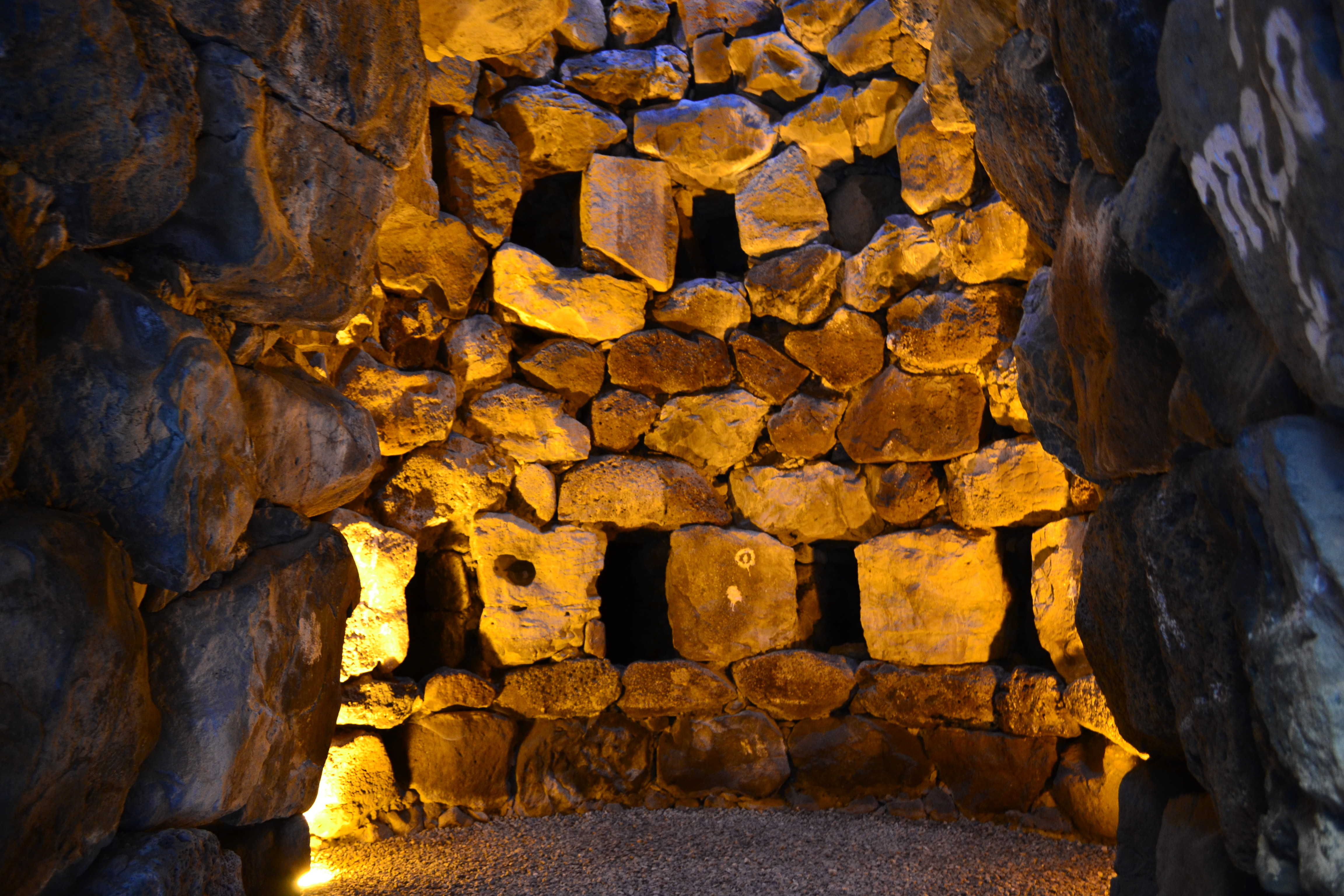 Complesso archeologico Su Nuraxi - MIBAC This is a photo of a monument which is part of cultural heritage of Italy.